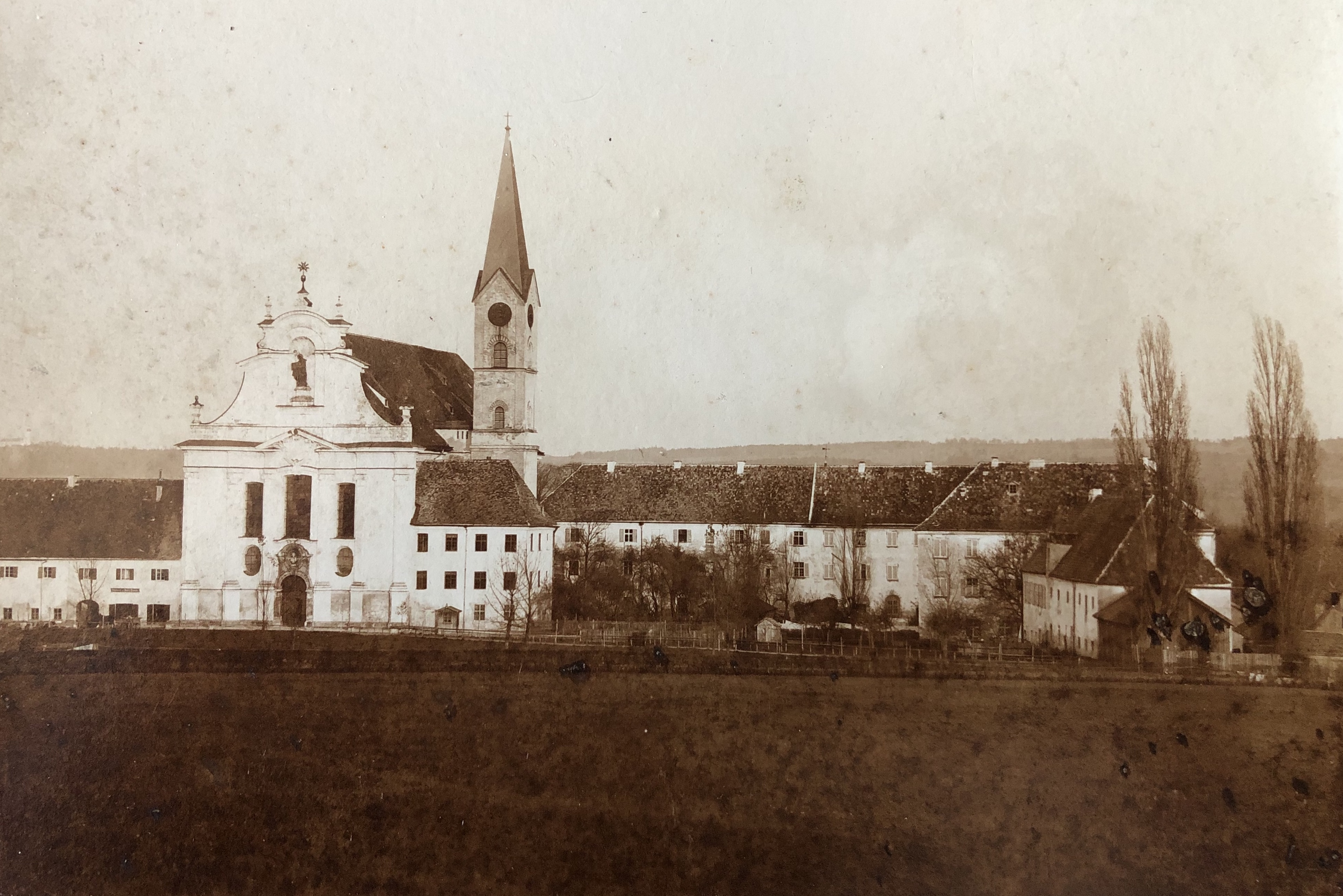 Westfassade Marienmünster und Kloster Dießen am Ammersee, Bayern, Deutschland; Blick von Westen, Josef Höbel 1940